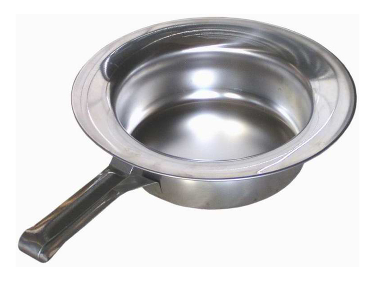 Edel-topf